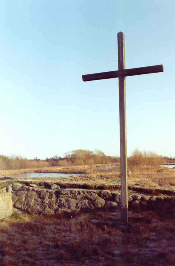 Skänninge hospital - Sveriges första sjukhus. Fotografi av Harri Blomberg, våren 1997.